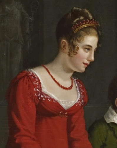 Portrait de Mlle Mosselman (Jeanne Mosselman (1799-1867), future Mme Fontenilliat)